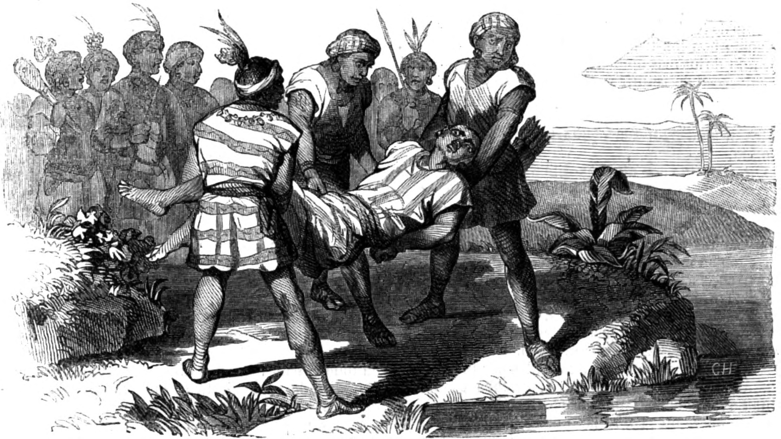 Grabado que representa la muerte del inca Huáscar, arrojado a un río des e un precipicio, por orden de su hermano Atahualpa. Febrero de 1533.